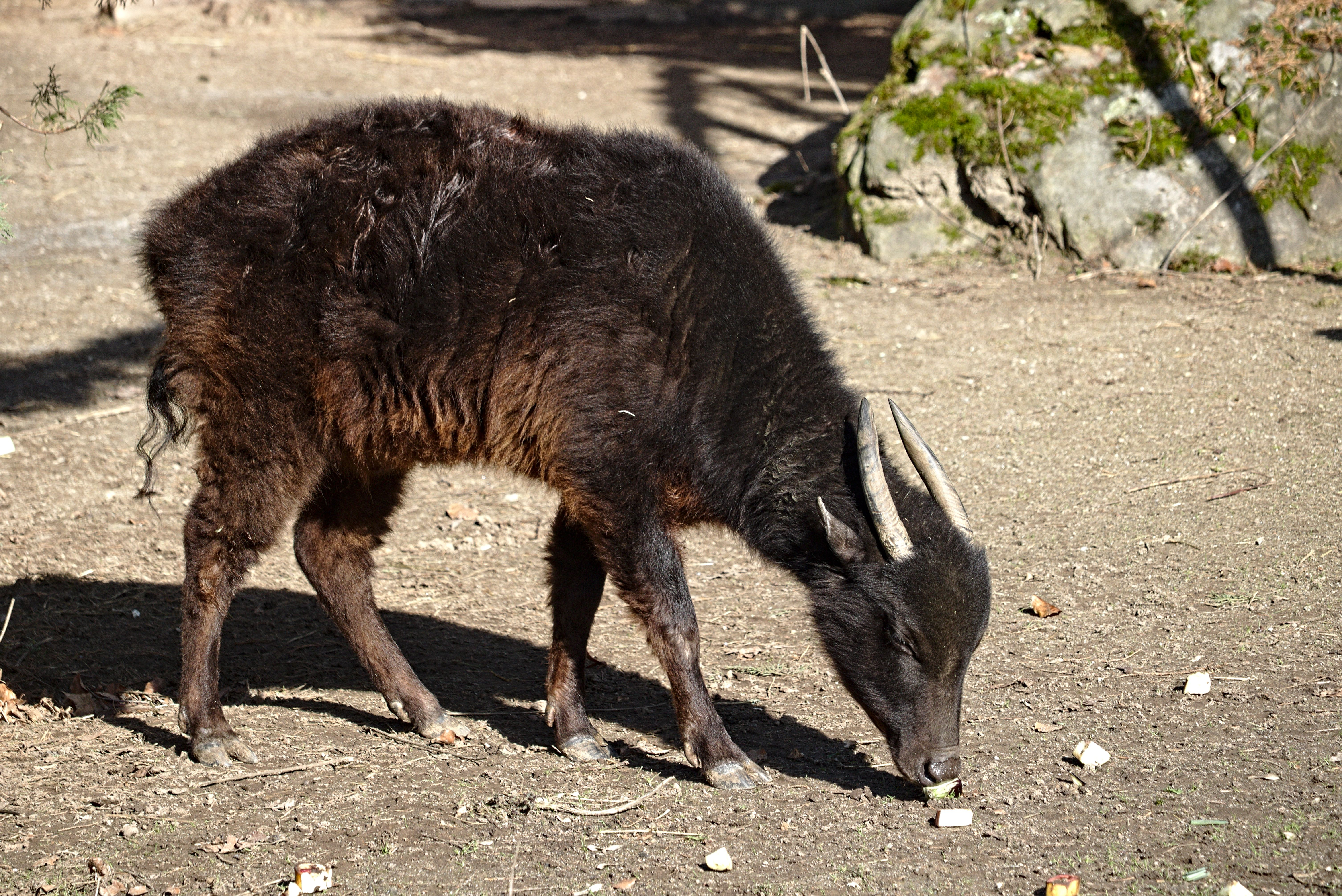 Individuum aus dem Zoo in Krefeld, Gesamtansicht